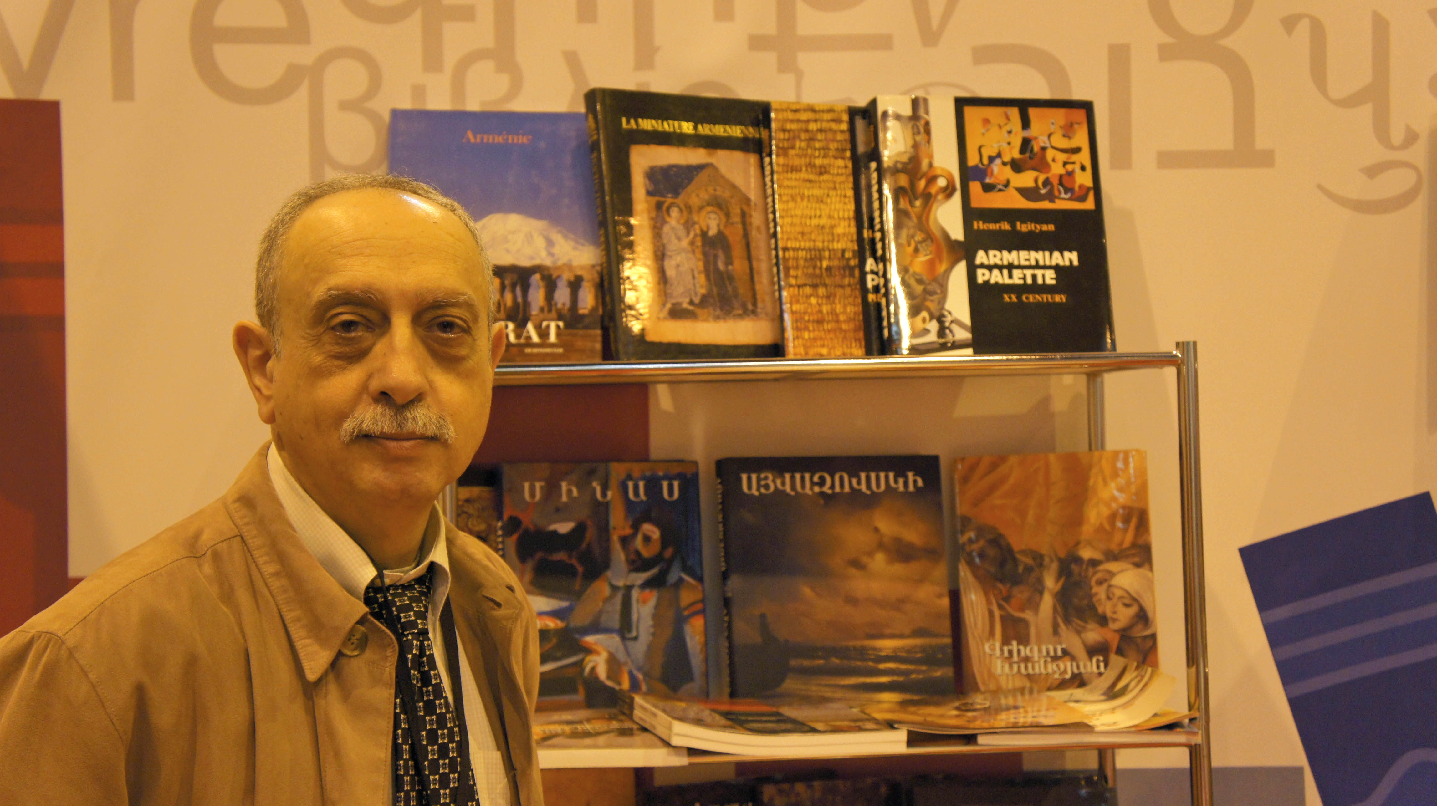 Le stand Arménie et Jean-Varoujan Sirapian au salon du Livre 2012.